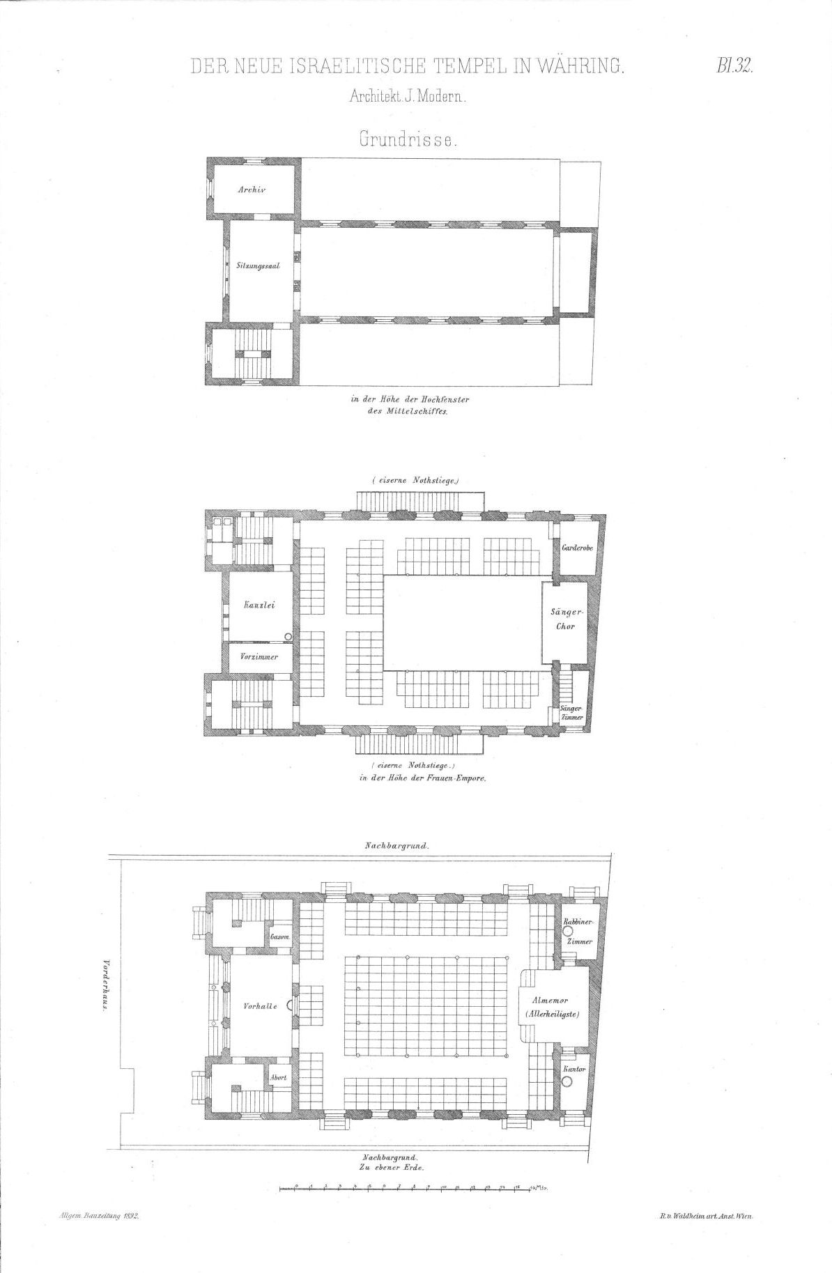 Allgemeine Bauzeitung 1892 Waehringer Tempel